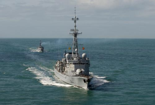 bateau